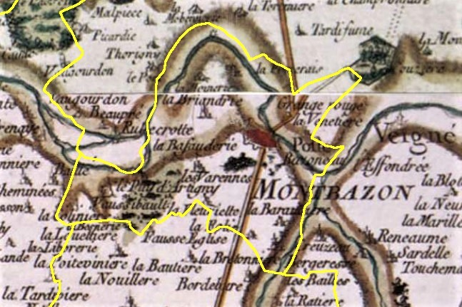 Monbazon sur la carte de Cassini